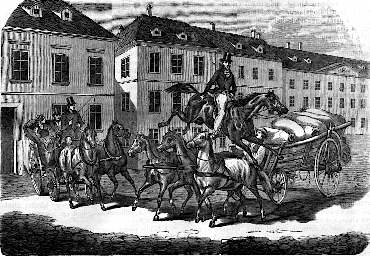 Sándor Móric 1822-ben a Király utca felé vágtatva, Tatár nevű lovával két egymás mellett haladó lovas kocsi közé szorult. Balról három lovas parasztkocsi, jobbról egy magán kocsi fogta közre. Szorult helyzetéből úgy szabadult meg, hogy lovát megsarkantyúzva átugratott a három egymás mellé fogott lovon.